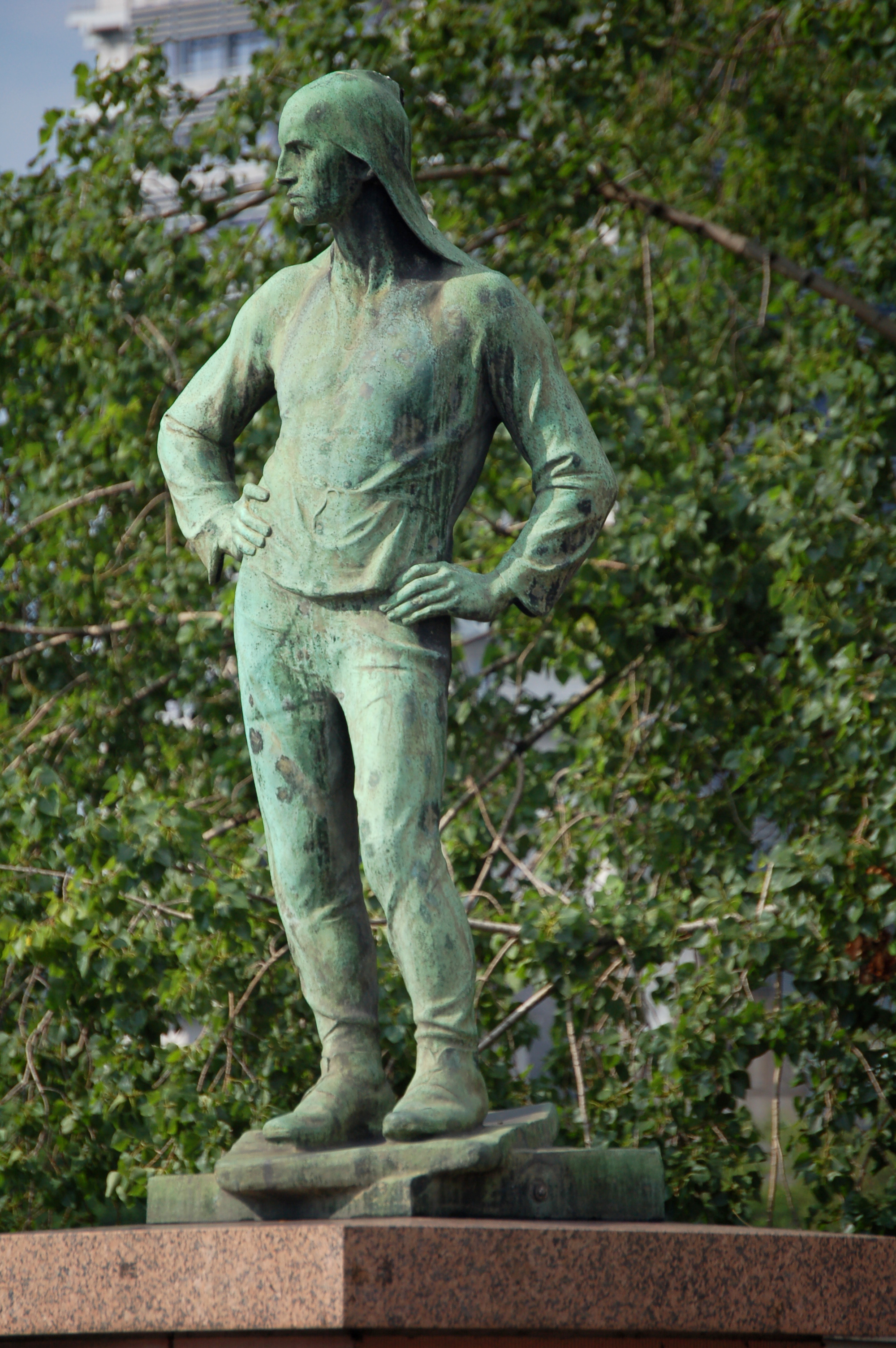 Skulptur „Der Hafenarbeiter“ am Südufer der Friedensbrücke in Frankfurt am Main